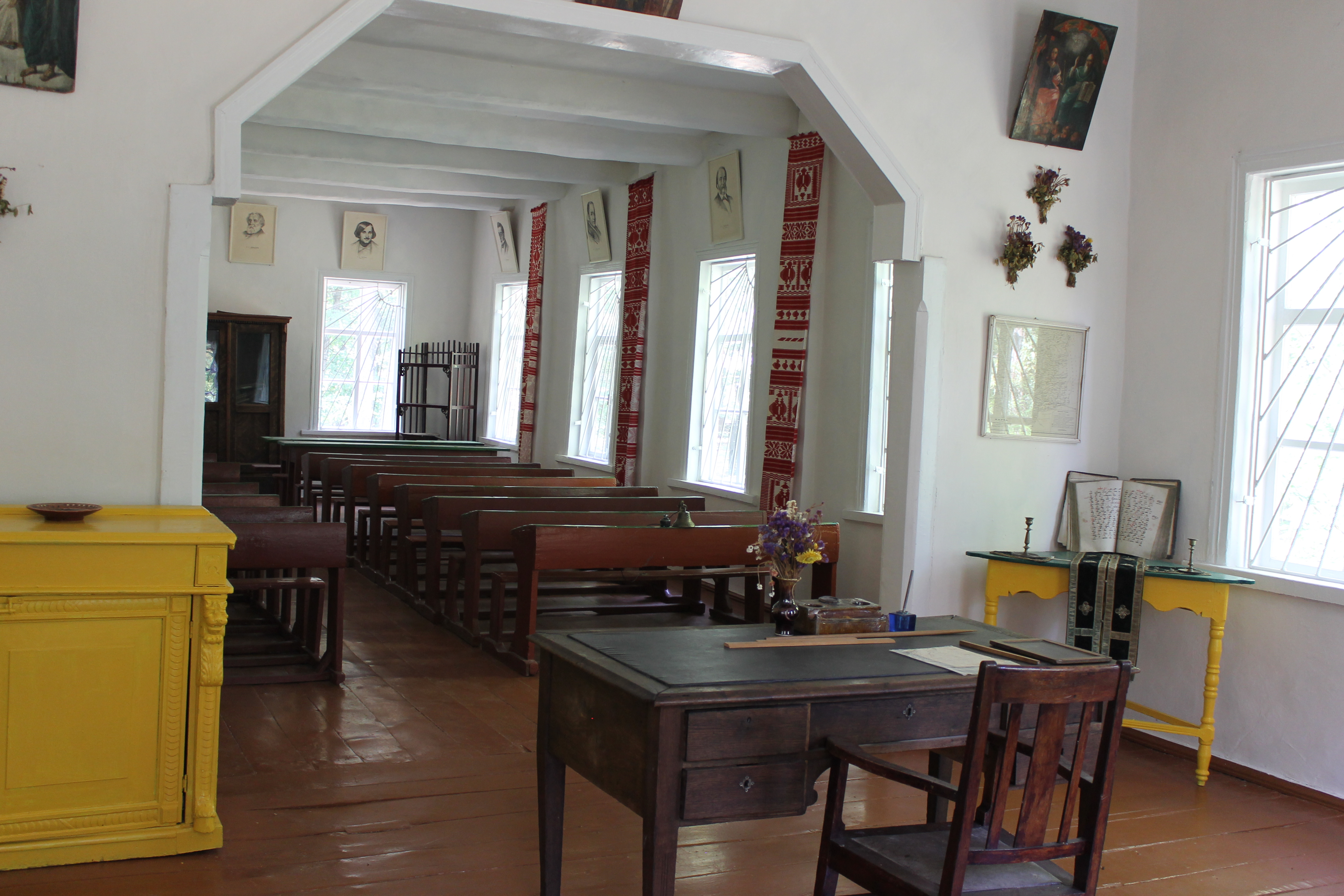 Фото 3. Церковнопарафіяльна школа. Інтер’єр класу., Церковно - парафіяльна школа з с. Помоклі